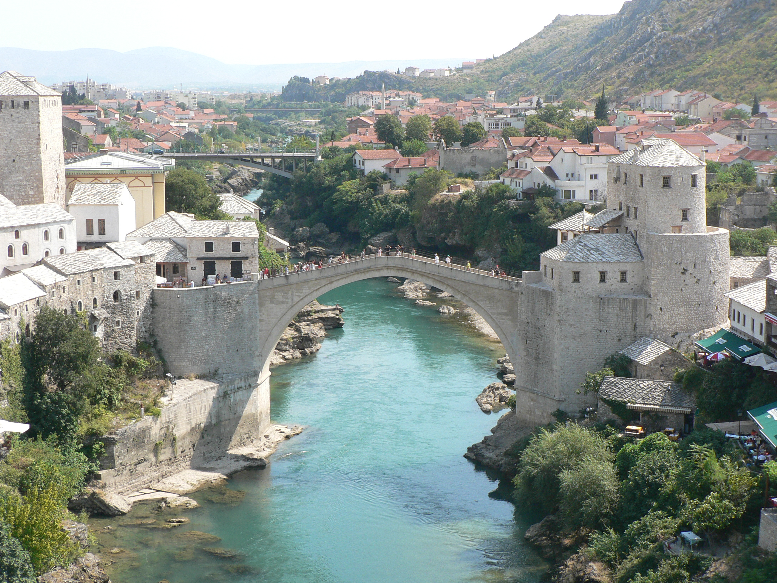 Mostar.